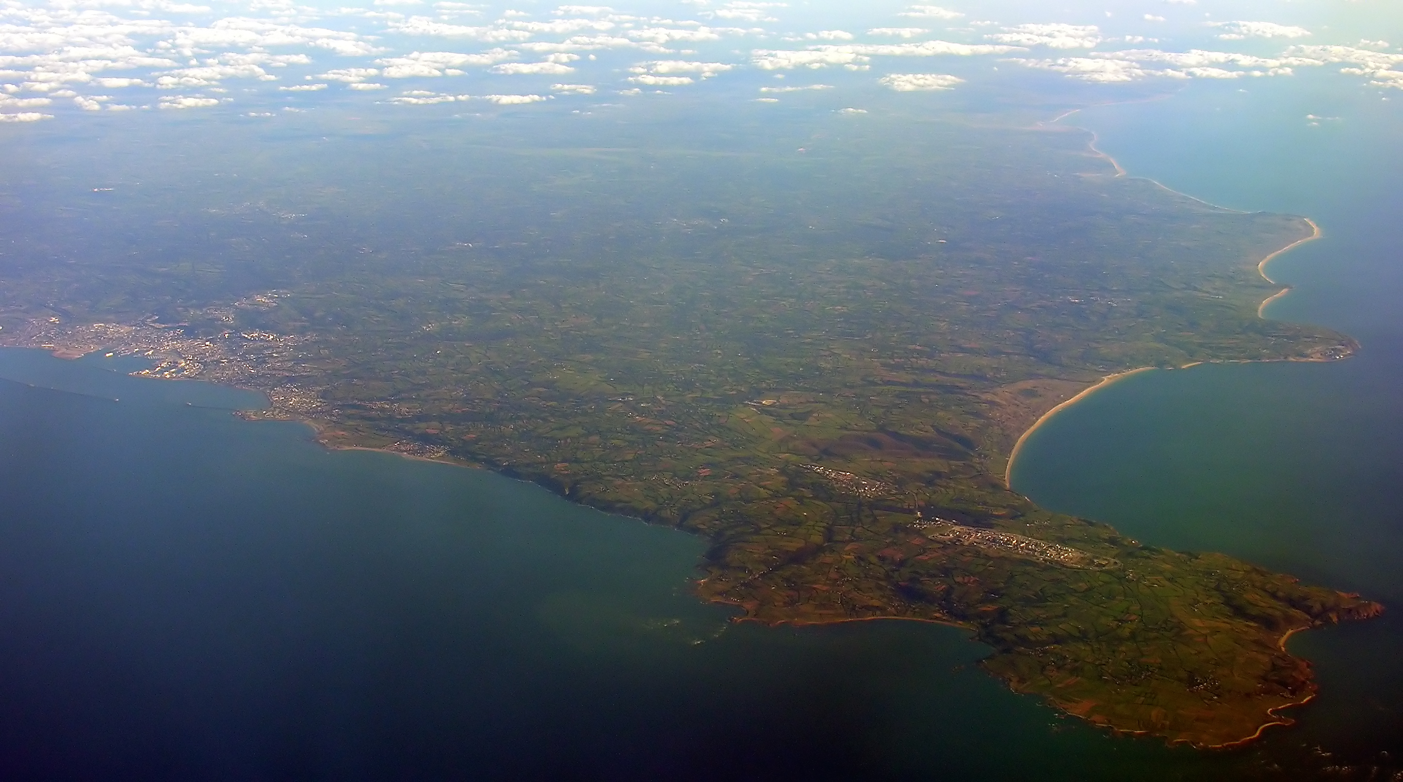 Péninsule de la Hague, et agglomération cherbourgeoise, vues du ciel